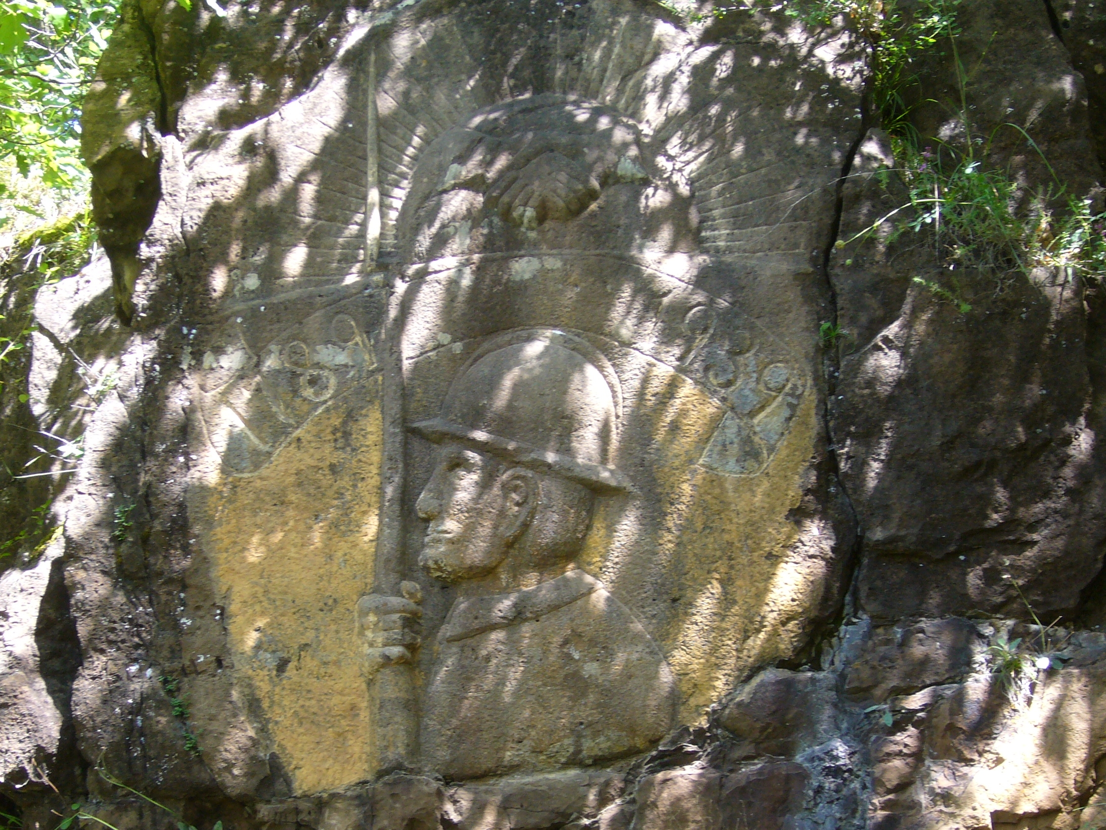 Rocher sculpté du camp de Rieucros ; Mende, Lozère, France